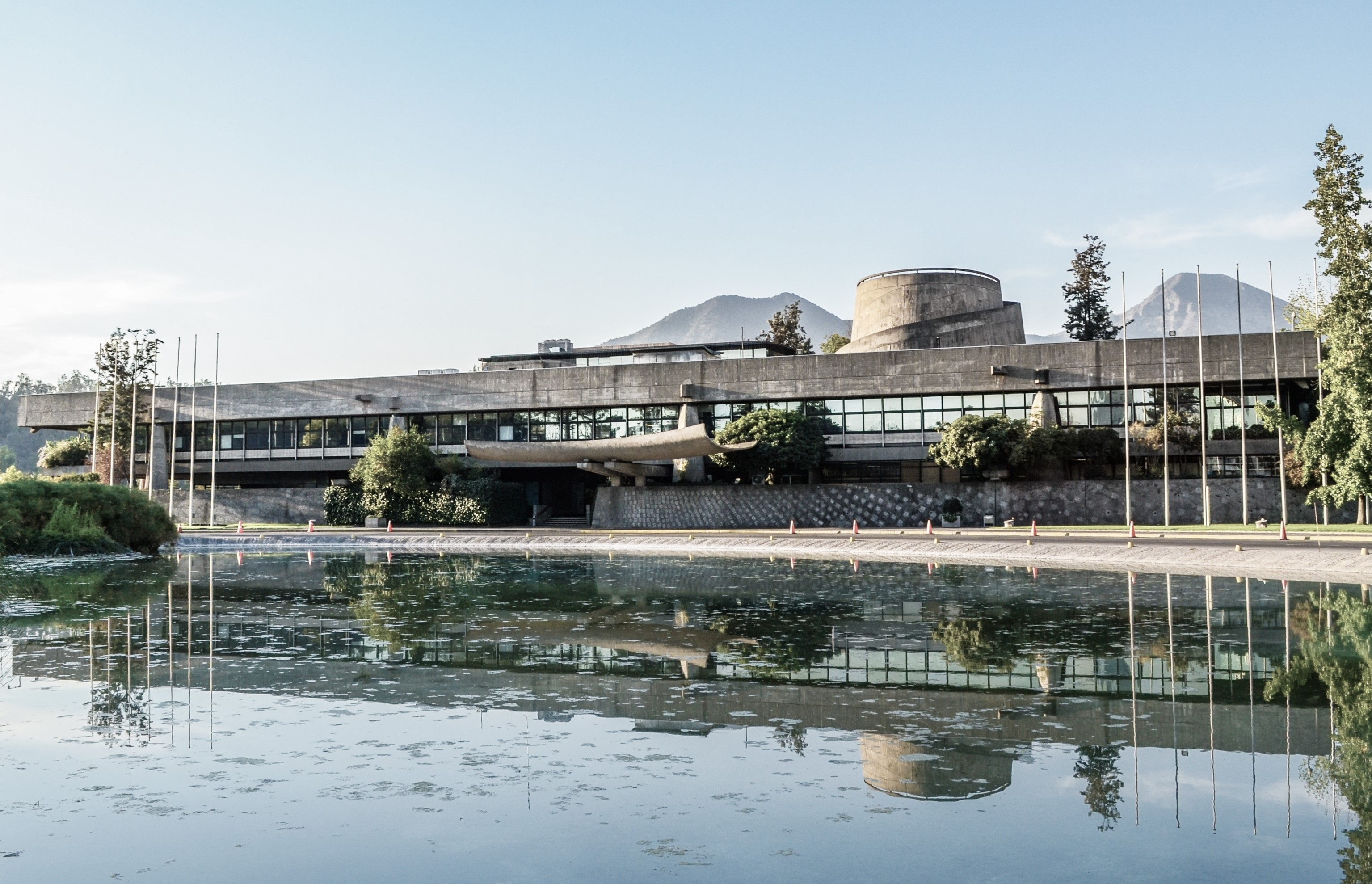 Edificio de la CEPAL en Chile - Reflejos